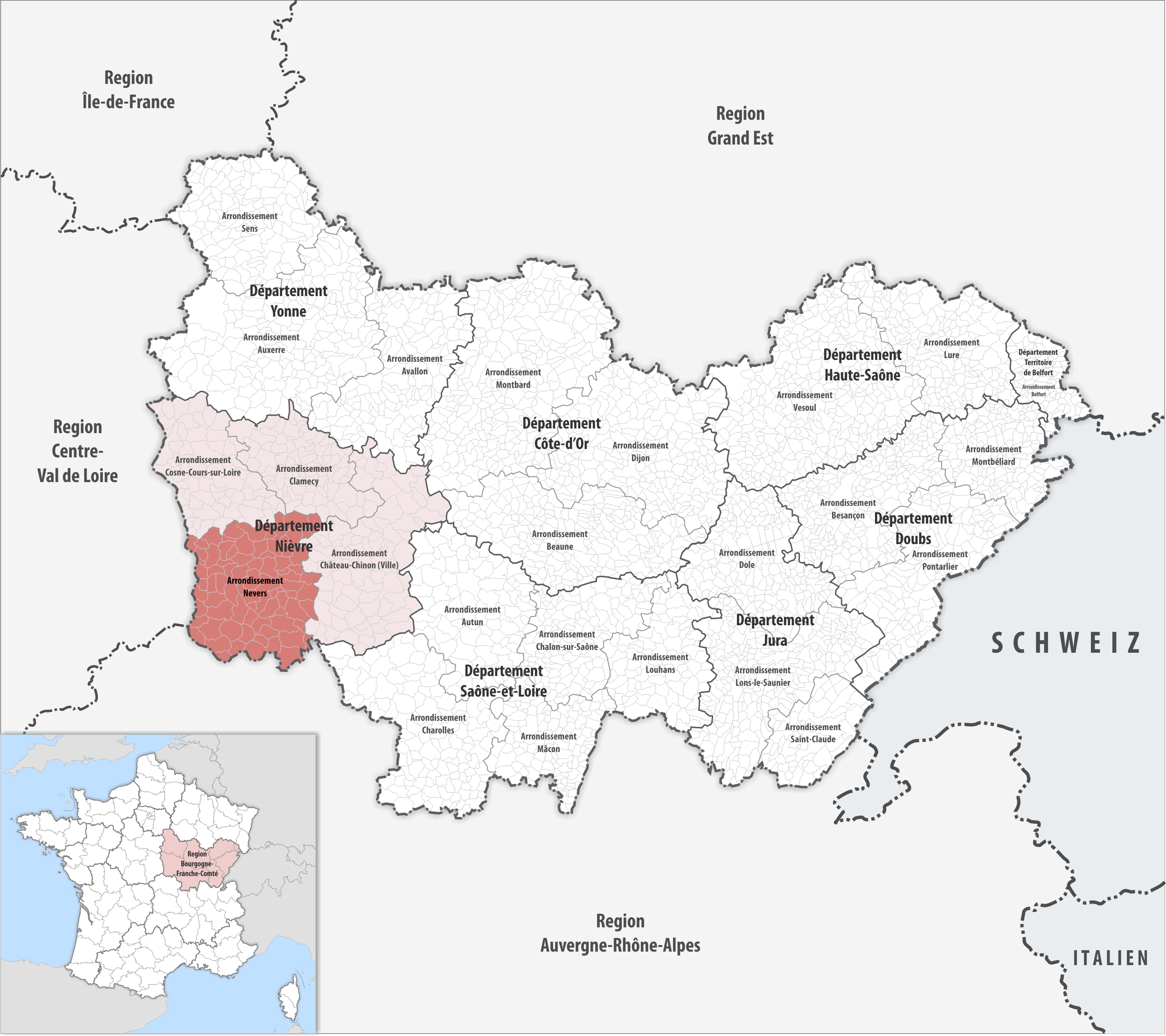 Lage des Arrondissements Nevers